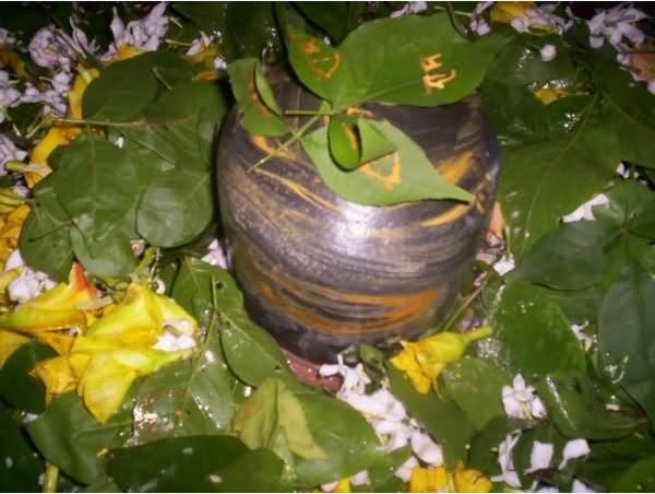 शिवलिंग बाबा महेंद्र नाथ मंदिर (मेहदार धाम) सिवान बिहार